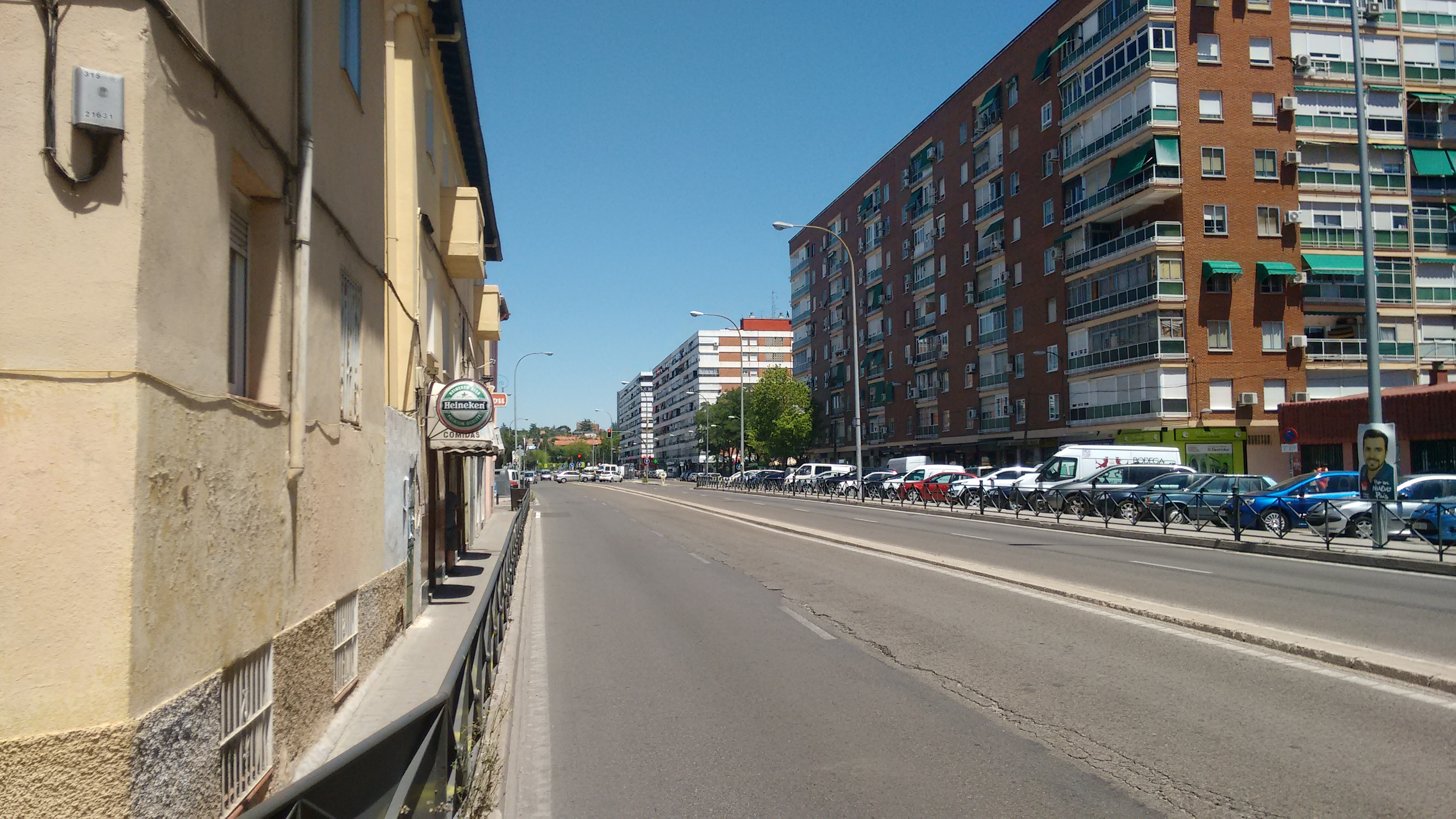 Avenida del Cardenal Herrera Oria